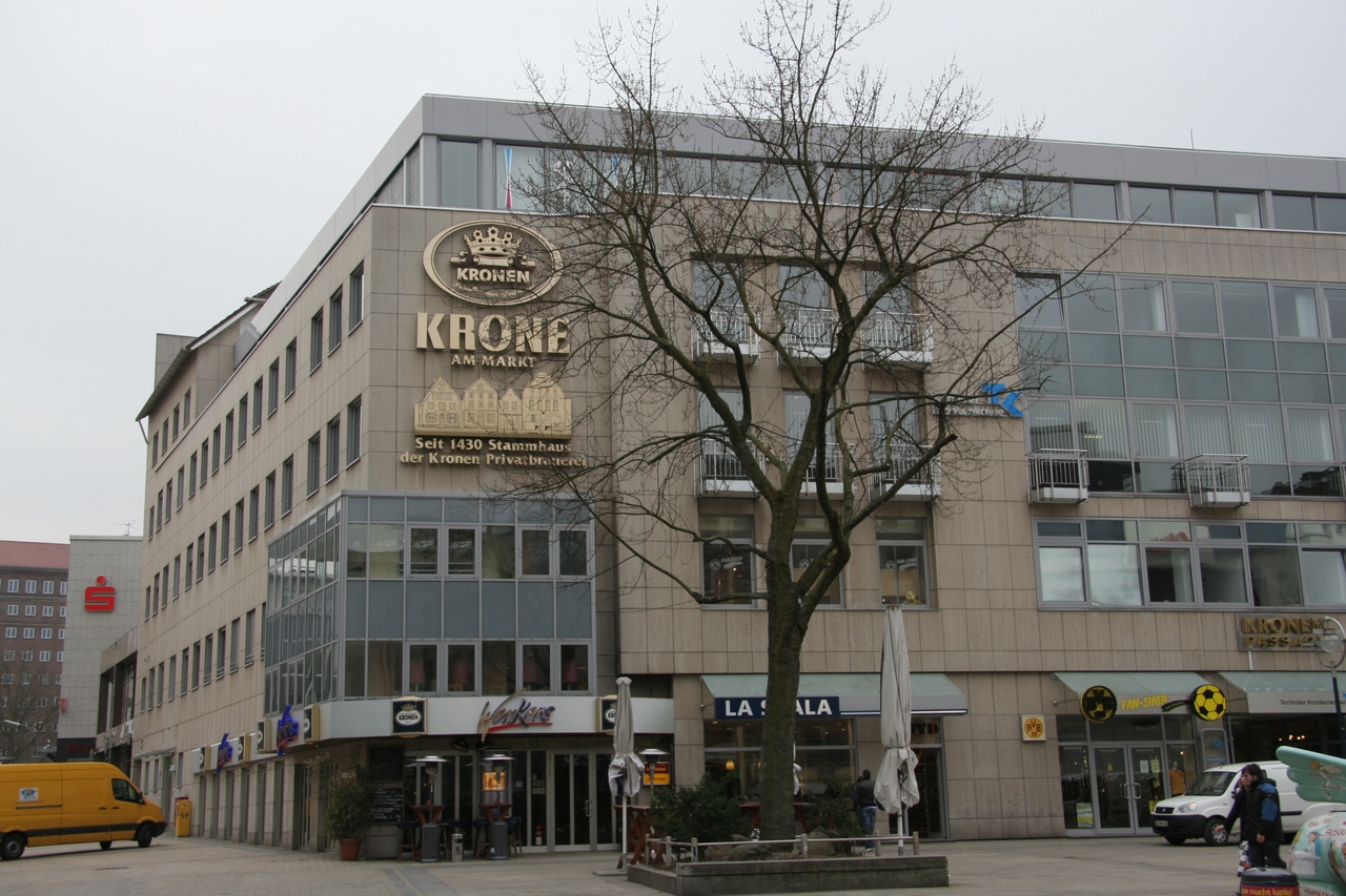 Deutschland, Dortmund, Alter Markt, Kronen am Alter Markt, Wenkers